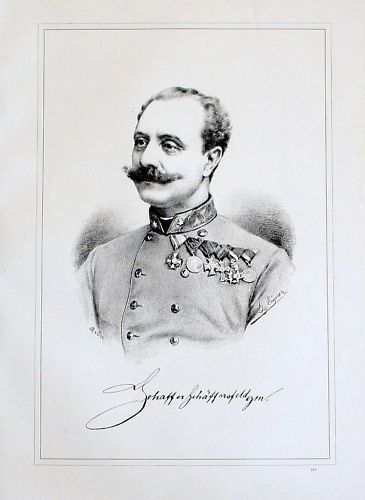 Der österreichische General Anton Schaffer von Schäffersfeld (1835-1910).